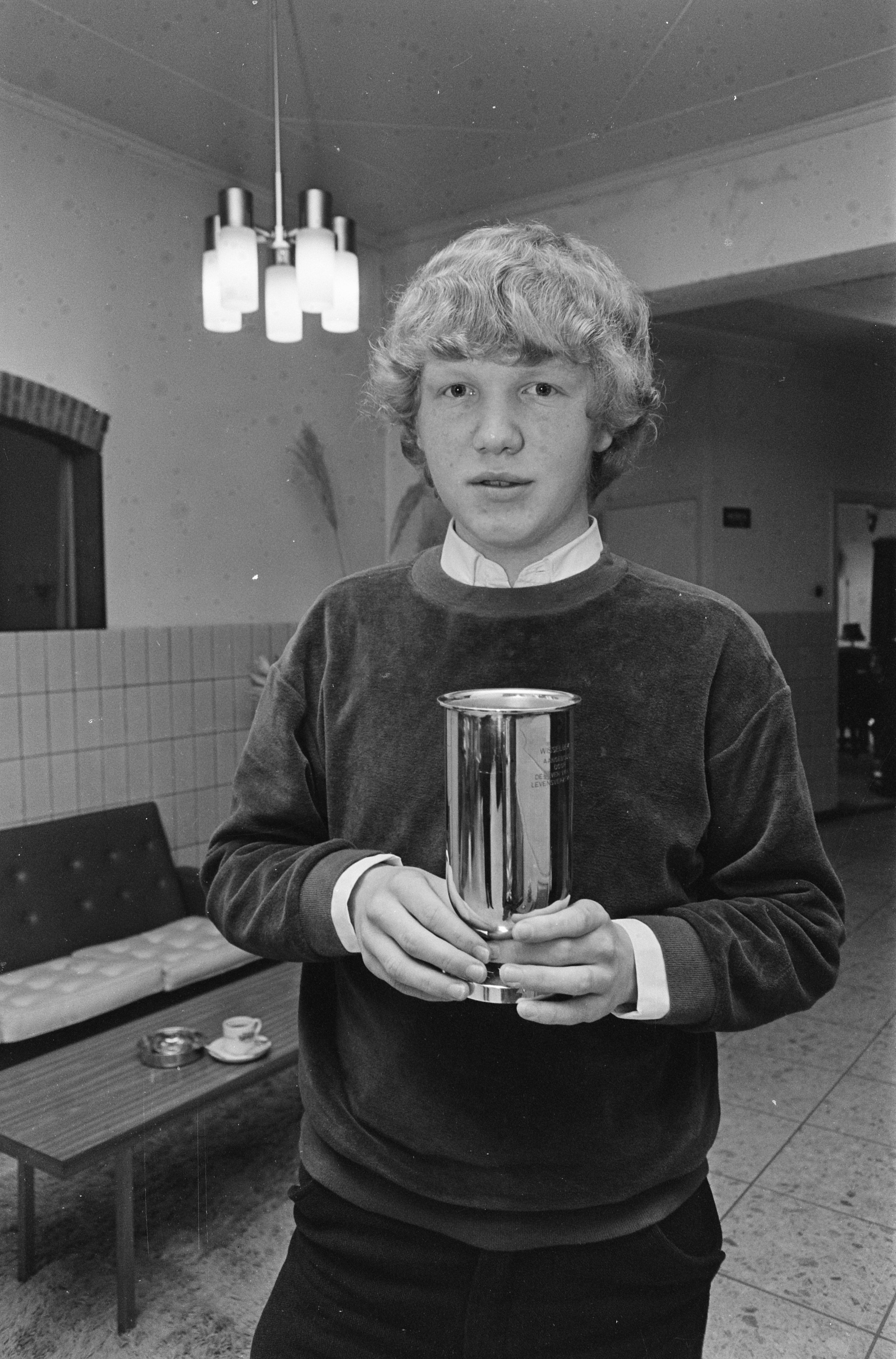 Ton Sijbrands damkampioen van Nederland, hier met beker te Apeldoorn